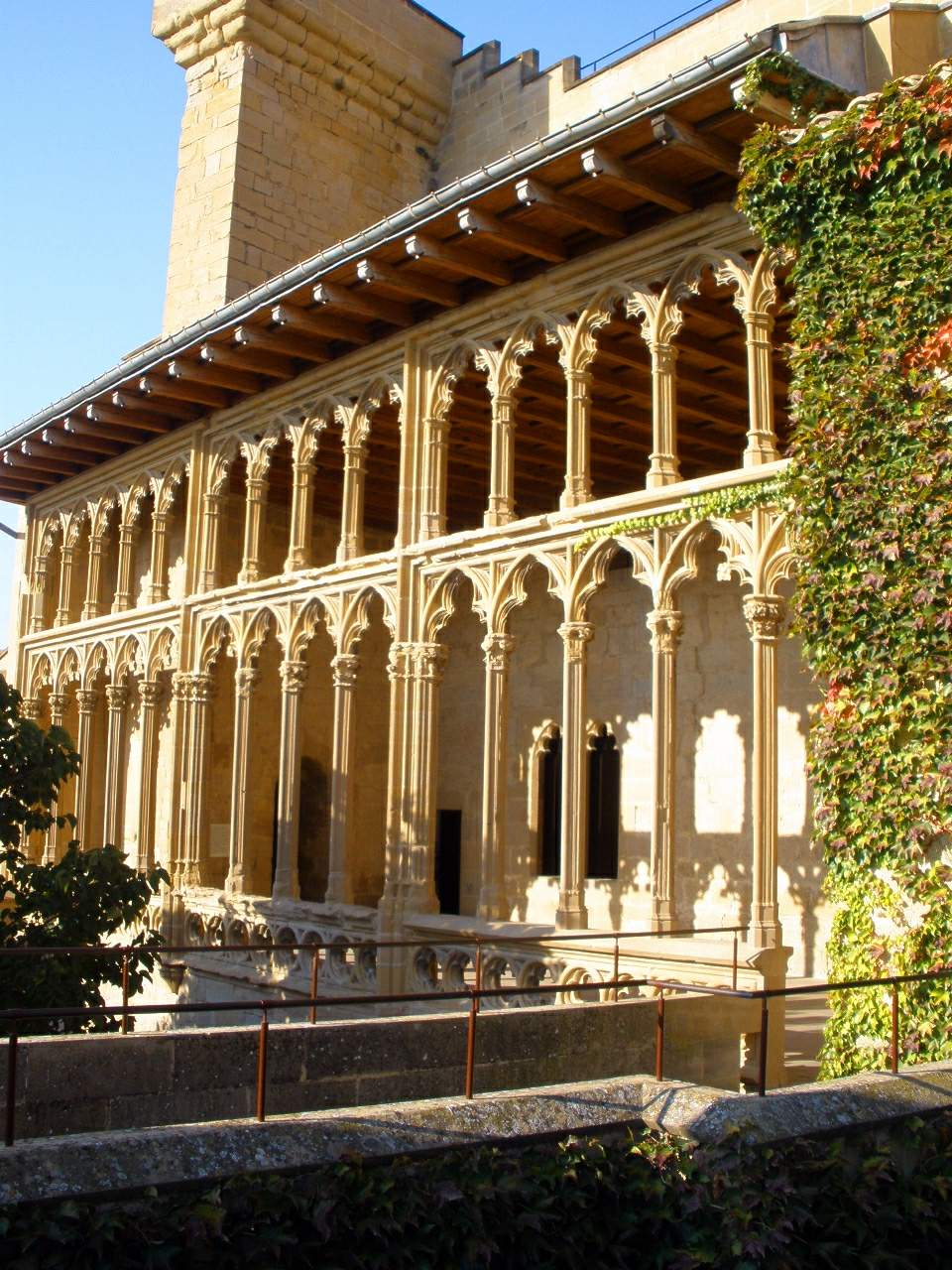 Galería del Rey, Palacio Real de Olite (Navarra)